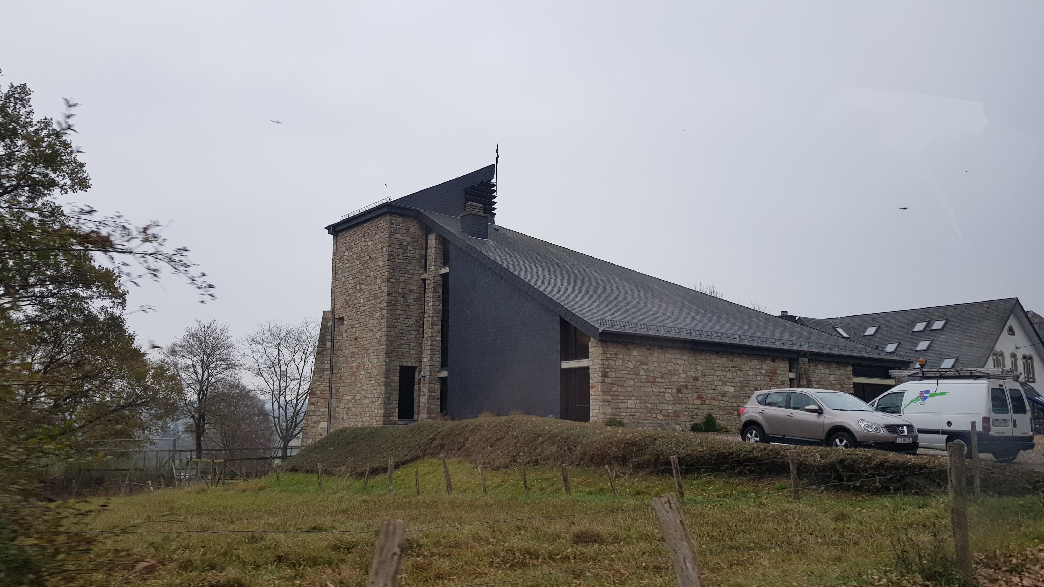 Kirche Iveldingen, Amel, Belgien